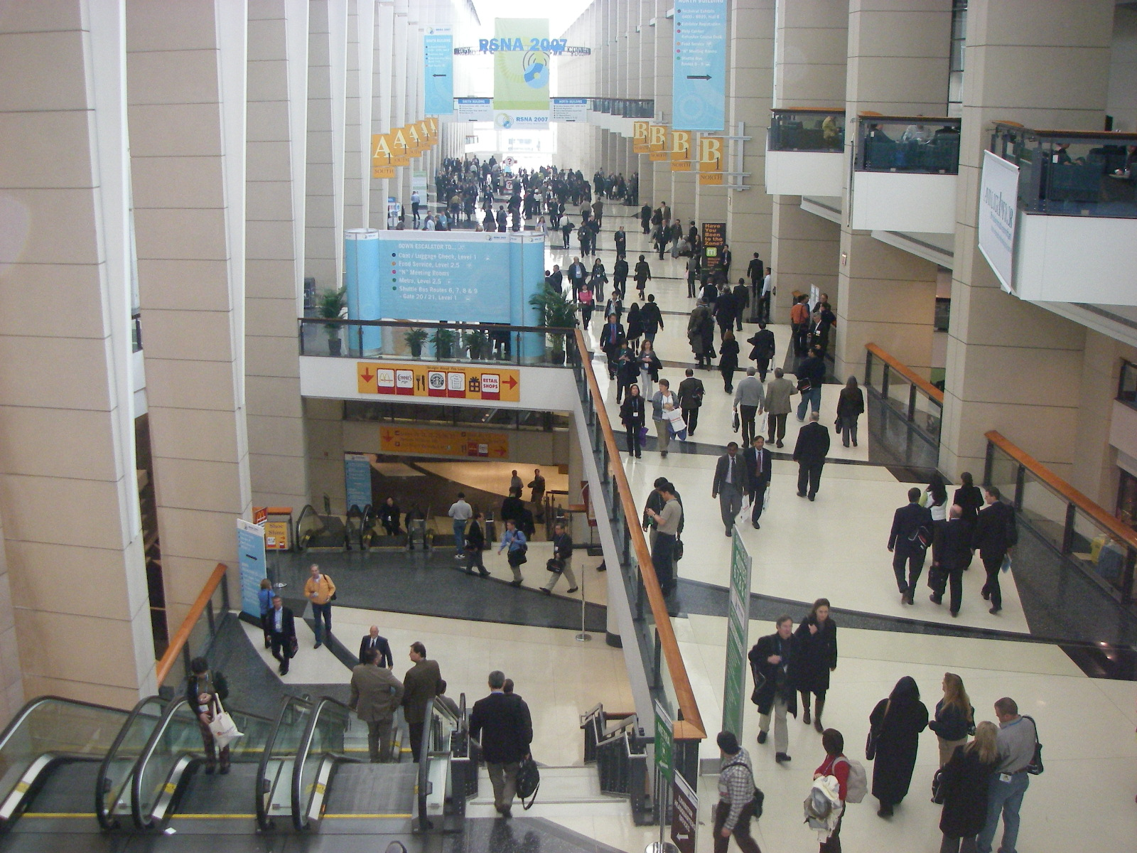 McCormick Place. Главный вестибюль.